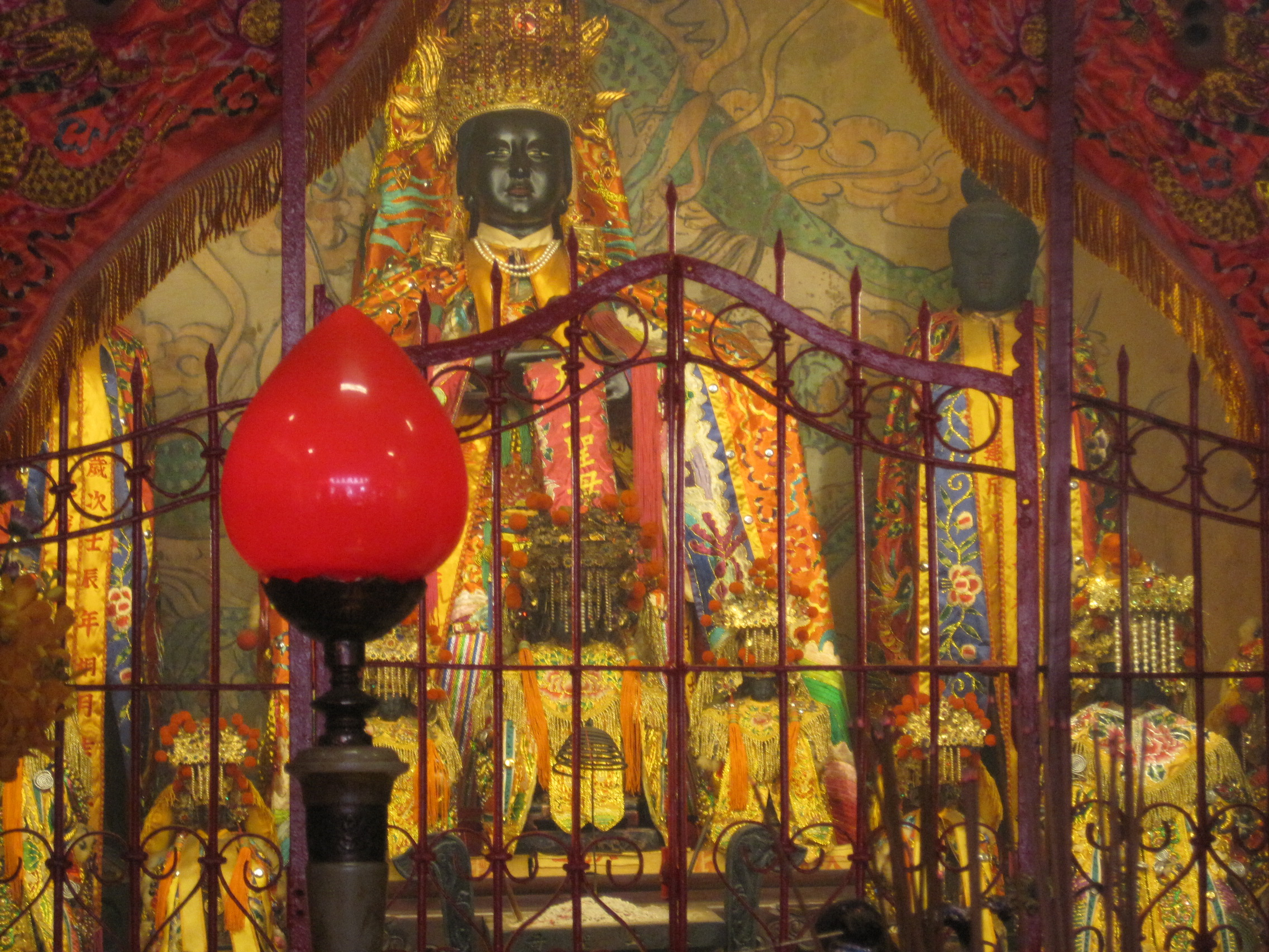 旗山天后宮媽祖神像